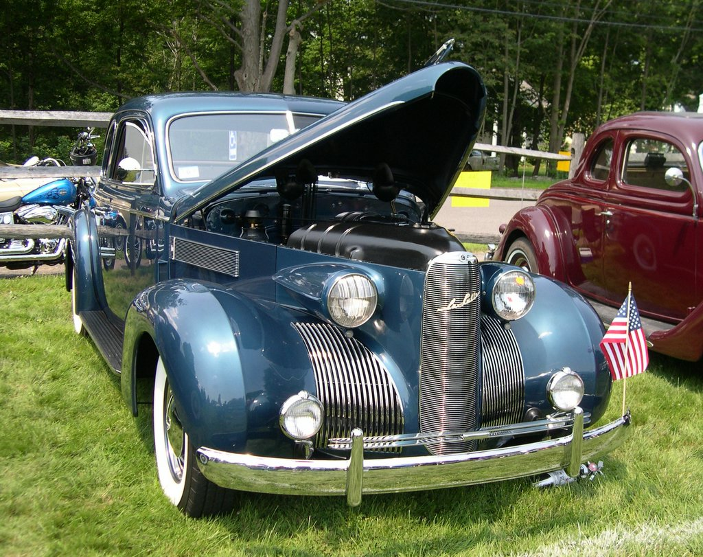 LaSalle 1939 Series 50 Coupe